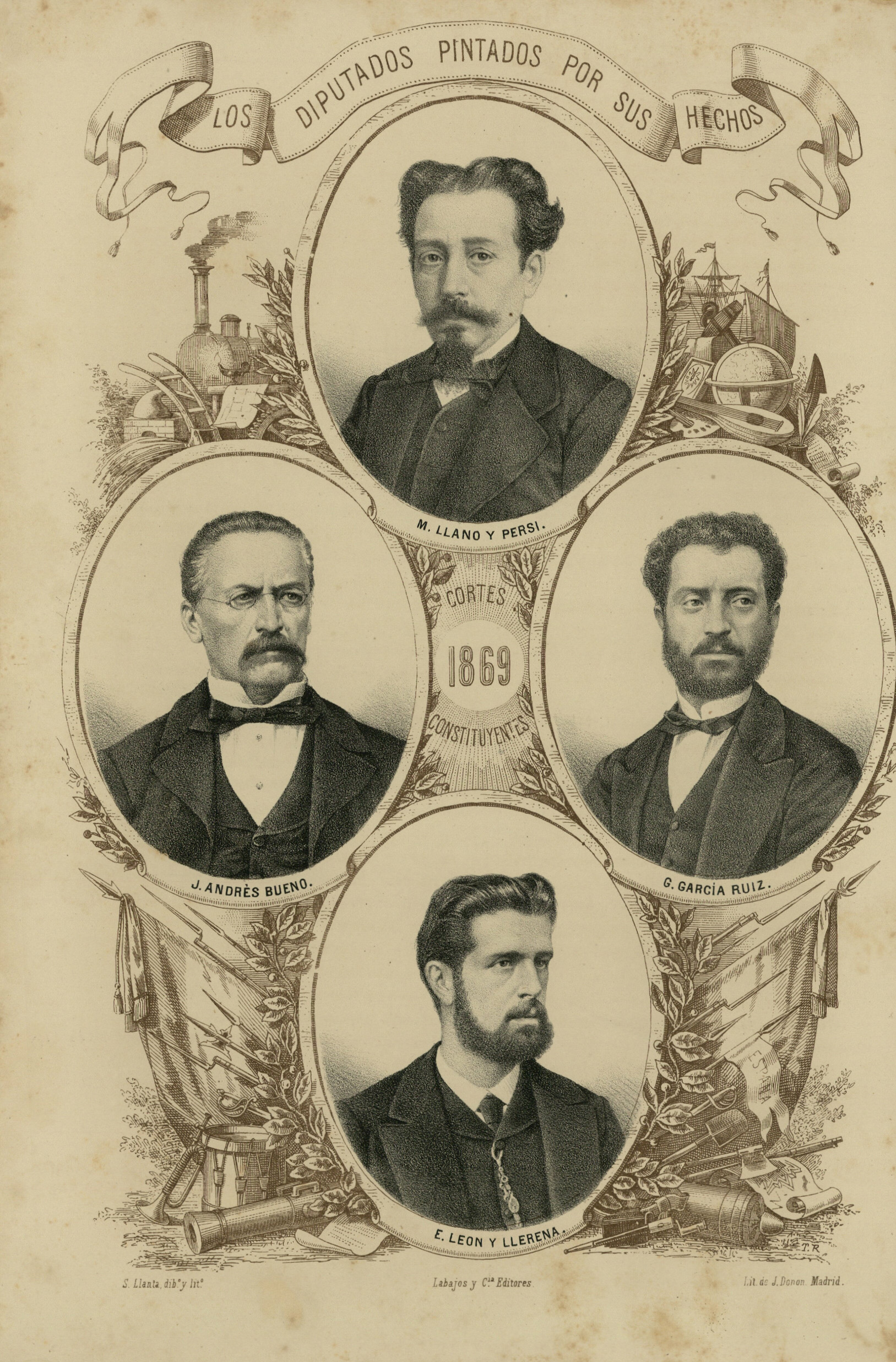 Manuel Llano y Persi, Juan Andrés Bueno, Gregorio García Ruiz, Eduardo León y Llerena.Litografía de Santiago Llanta para "Los diputados pintados por sus hechos. Colección de estudios biográficos sobre los elegidos por el sufragio universal en las constituyentes de 1869 recopilados por distintos literatos", t. II, Madrid, R. Labajos y Compañía editores, 1869.